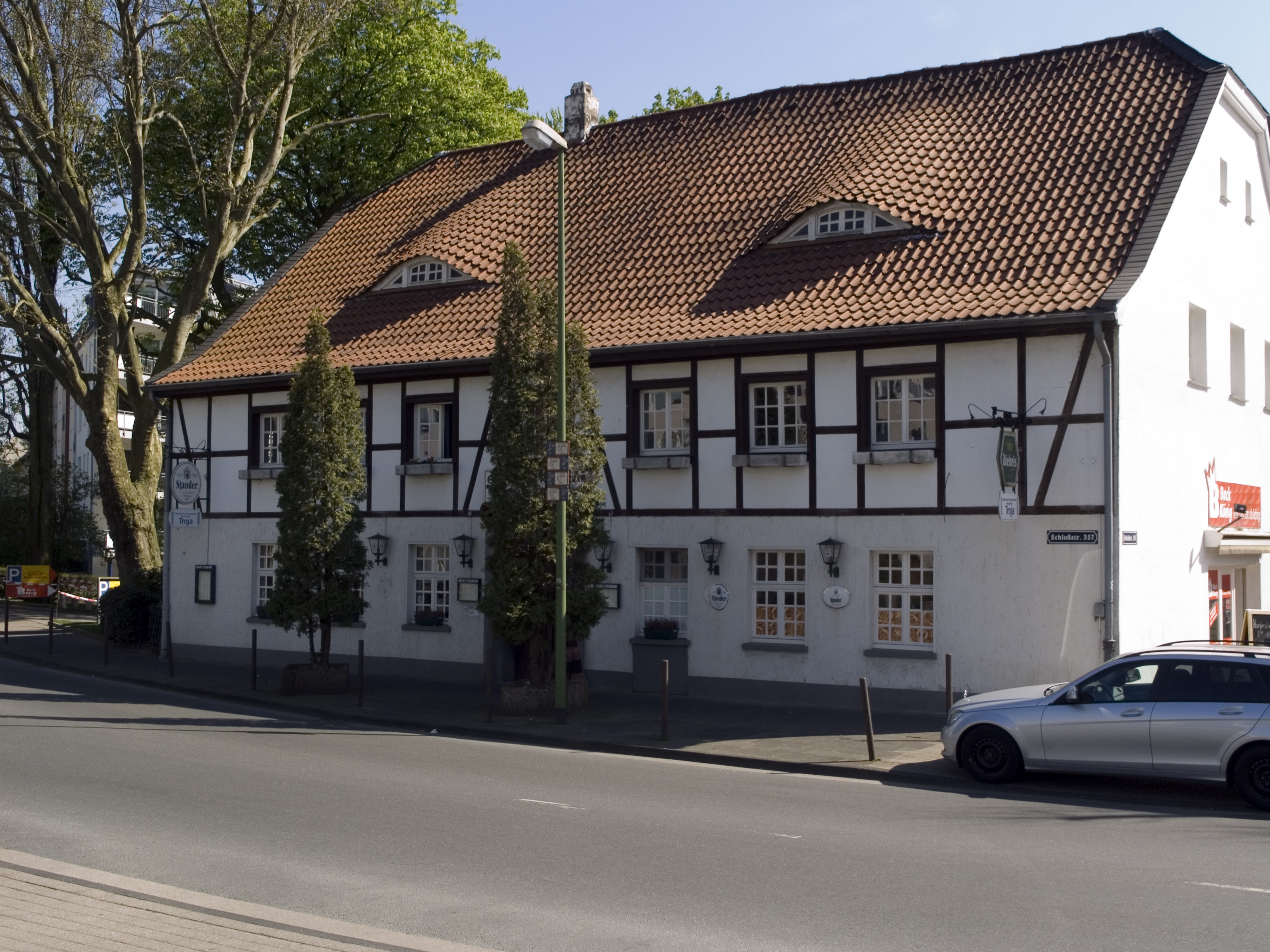 Северный Рейн - Вестфалия, Эссен - ресторан на Schloßstraße во Фринтропе